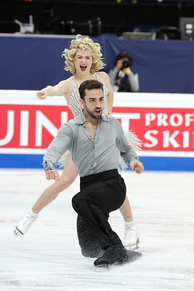 Оливия Смарт / Адрия Диас (Испания) на чемпионате мира 2017